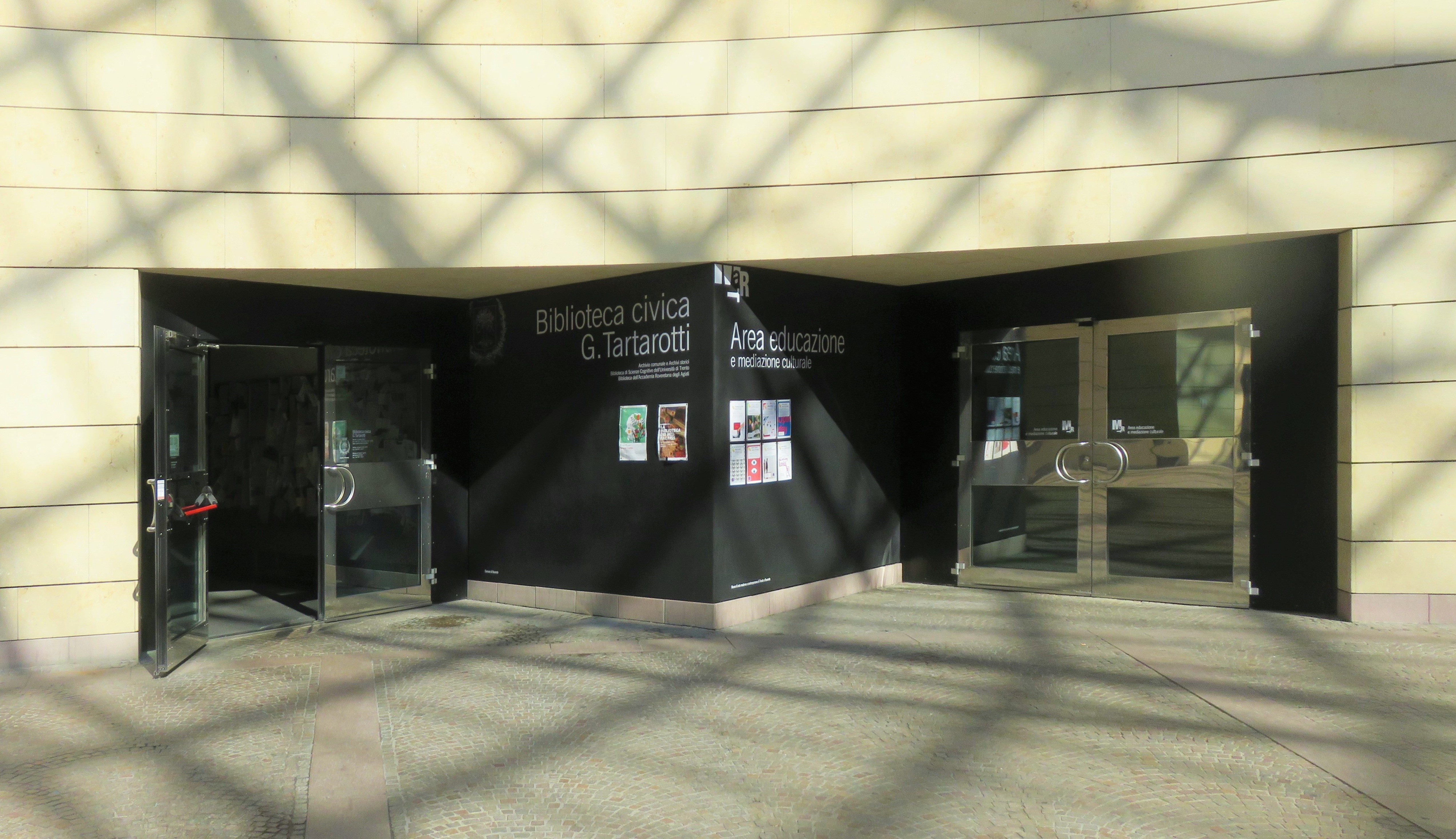 Ingresso principale sotto la cupola del Mart recentemente rinnovato